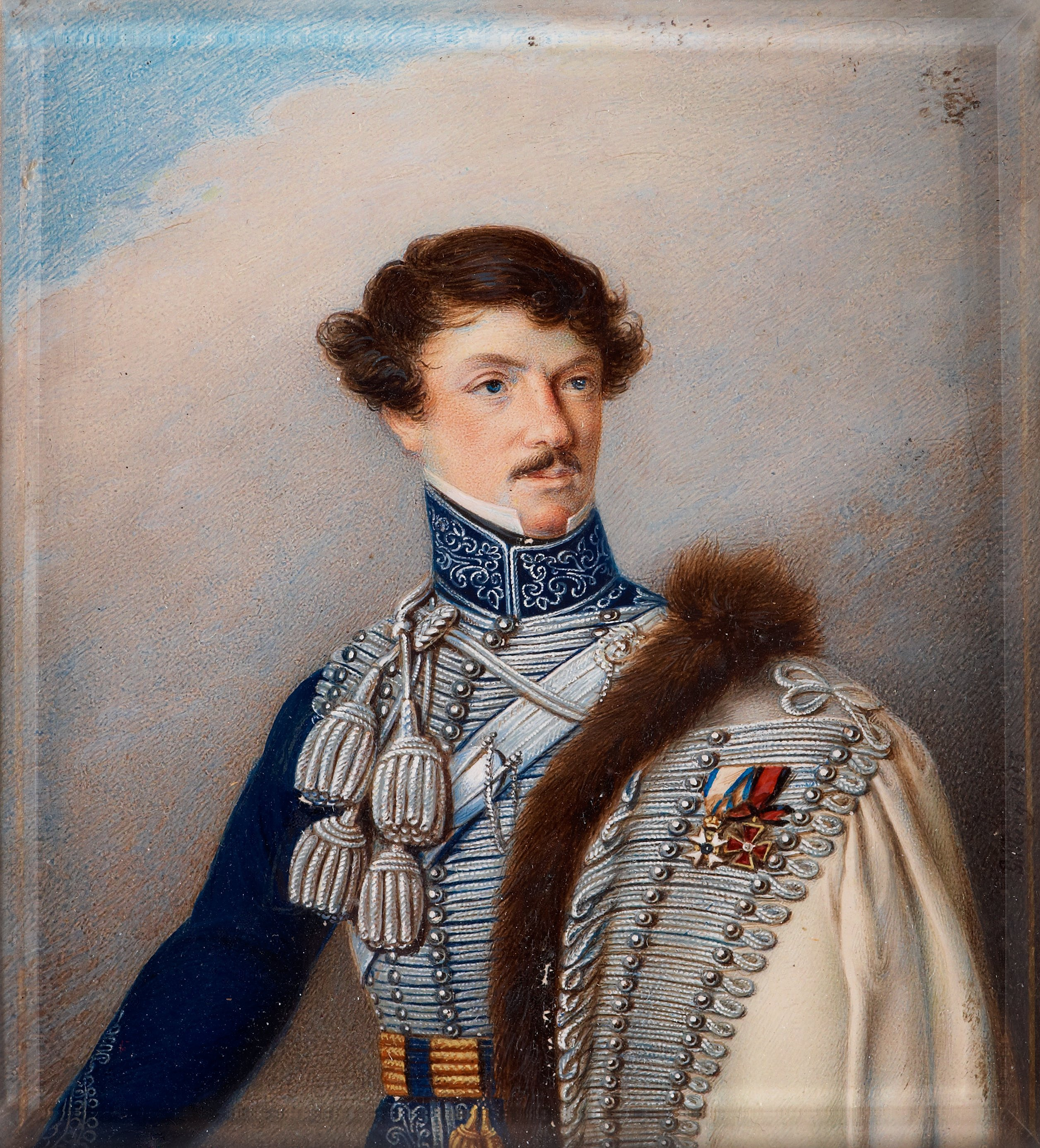 Jakob Wilhelm Sprengtporten i uniform för Livgardet till Häst. På bröstet bär han Svärdsorden och ryska Sankt Vladimirs orden. Målning från 1825 av Jacob Axel Gillberg.